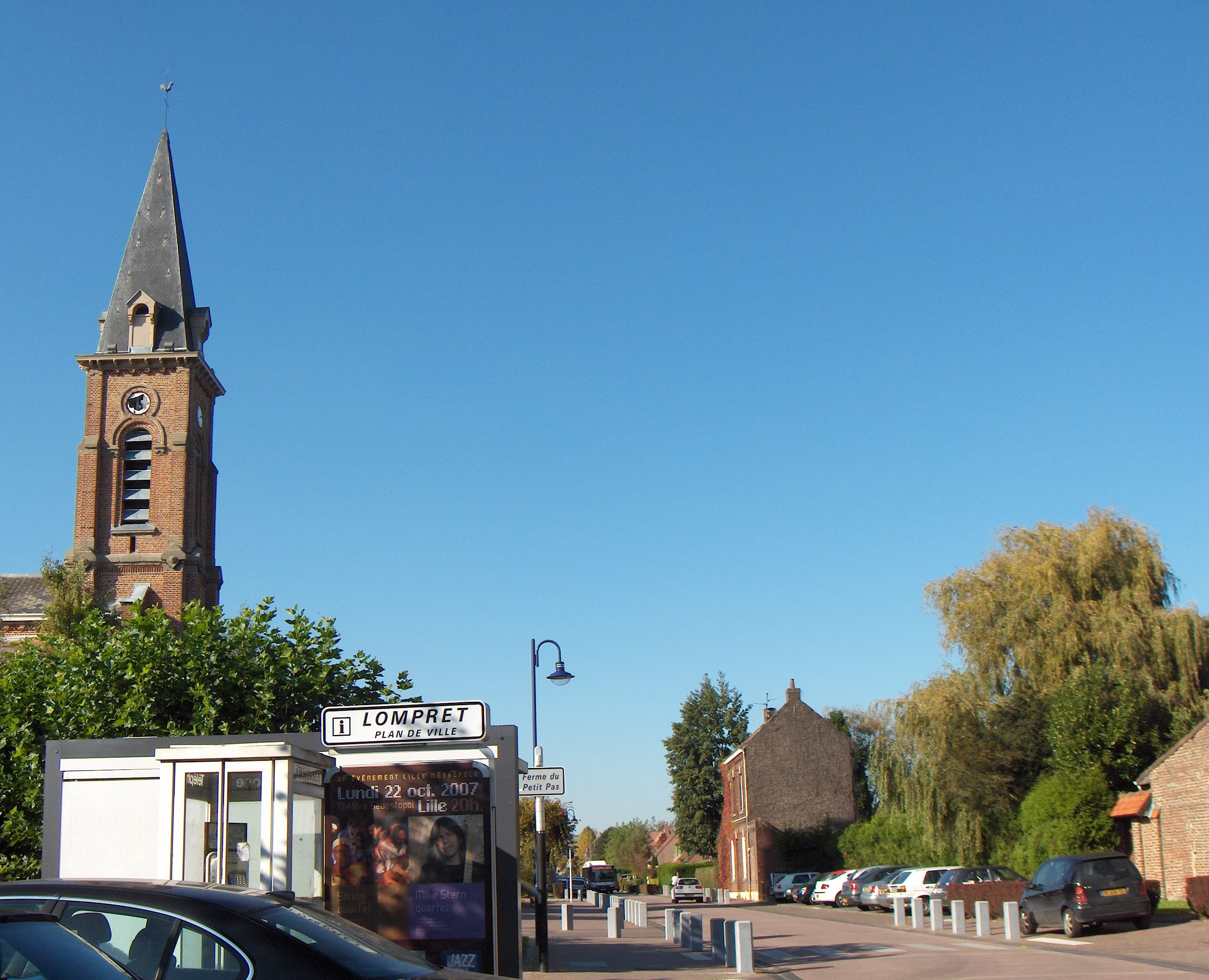 Lompret, rue de l'église